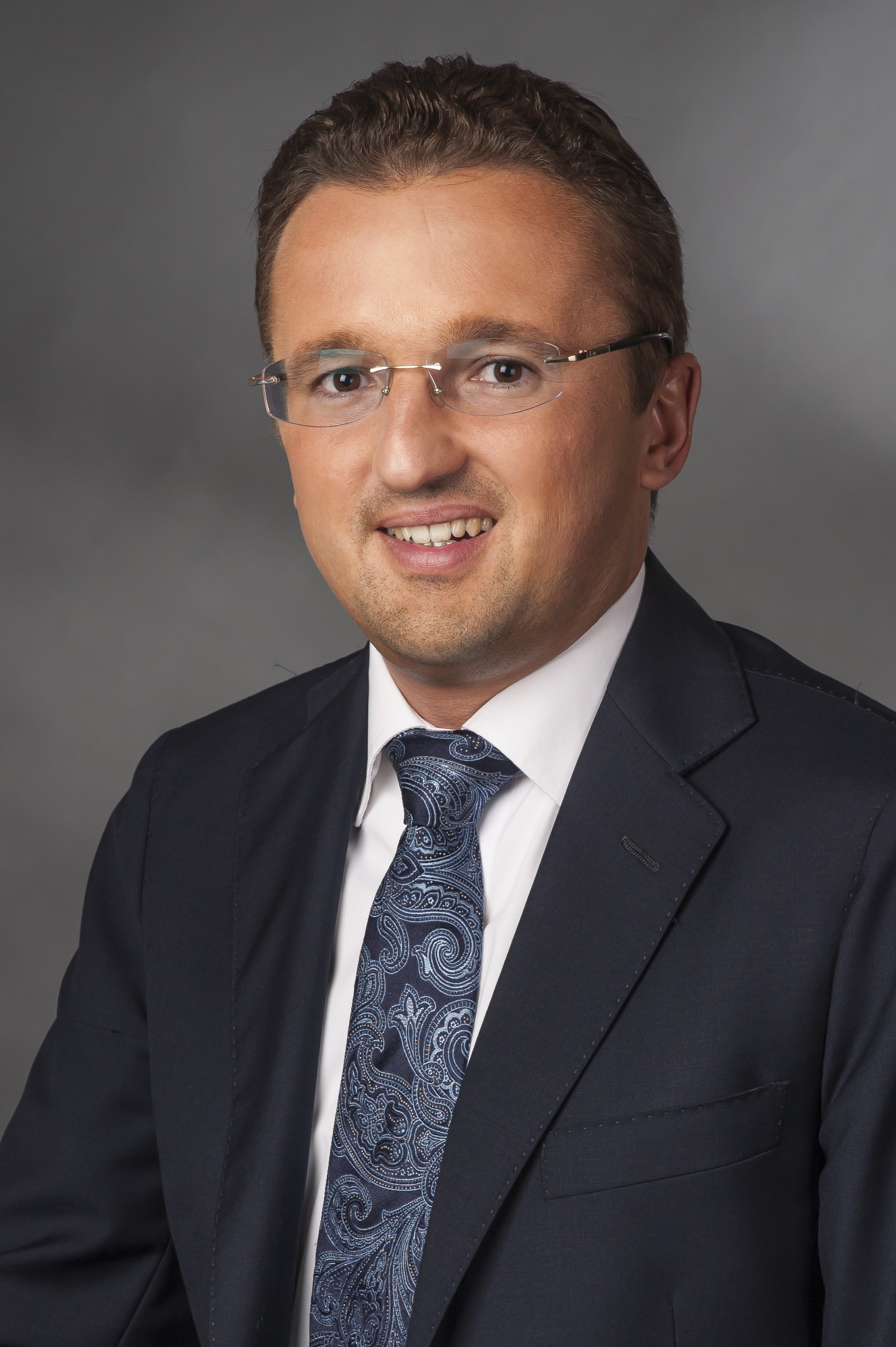 Carsten Körber (* 11. Juni 1979 in Zwickau) ist ein deutscher Politiker (CDU) und seit 2013 Mitglied des 18. Deutschen Bundestags.